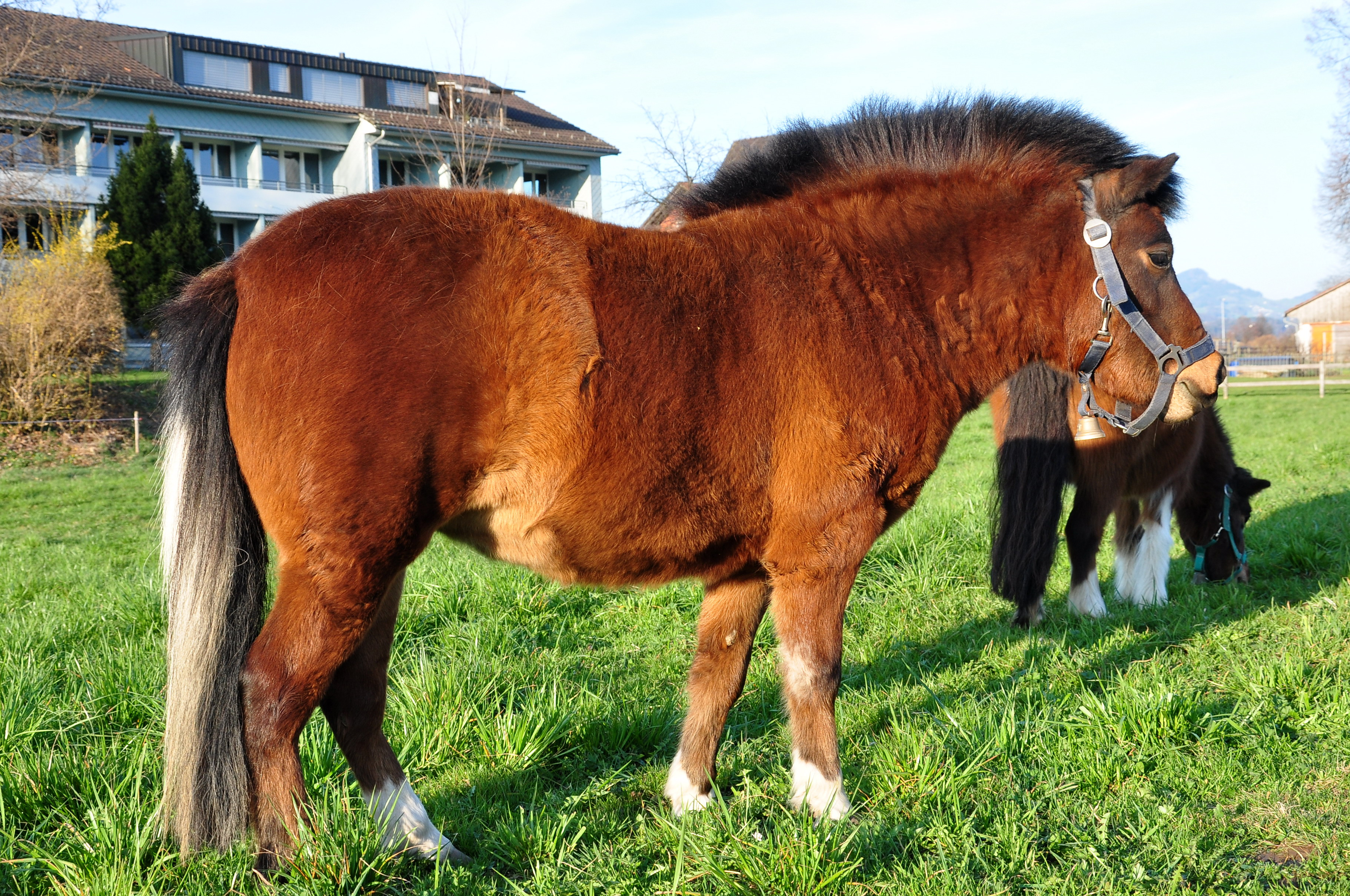 Busskirch in Jona (Switzerland)